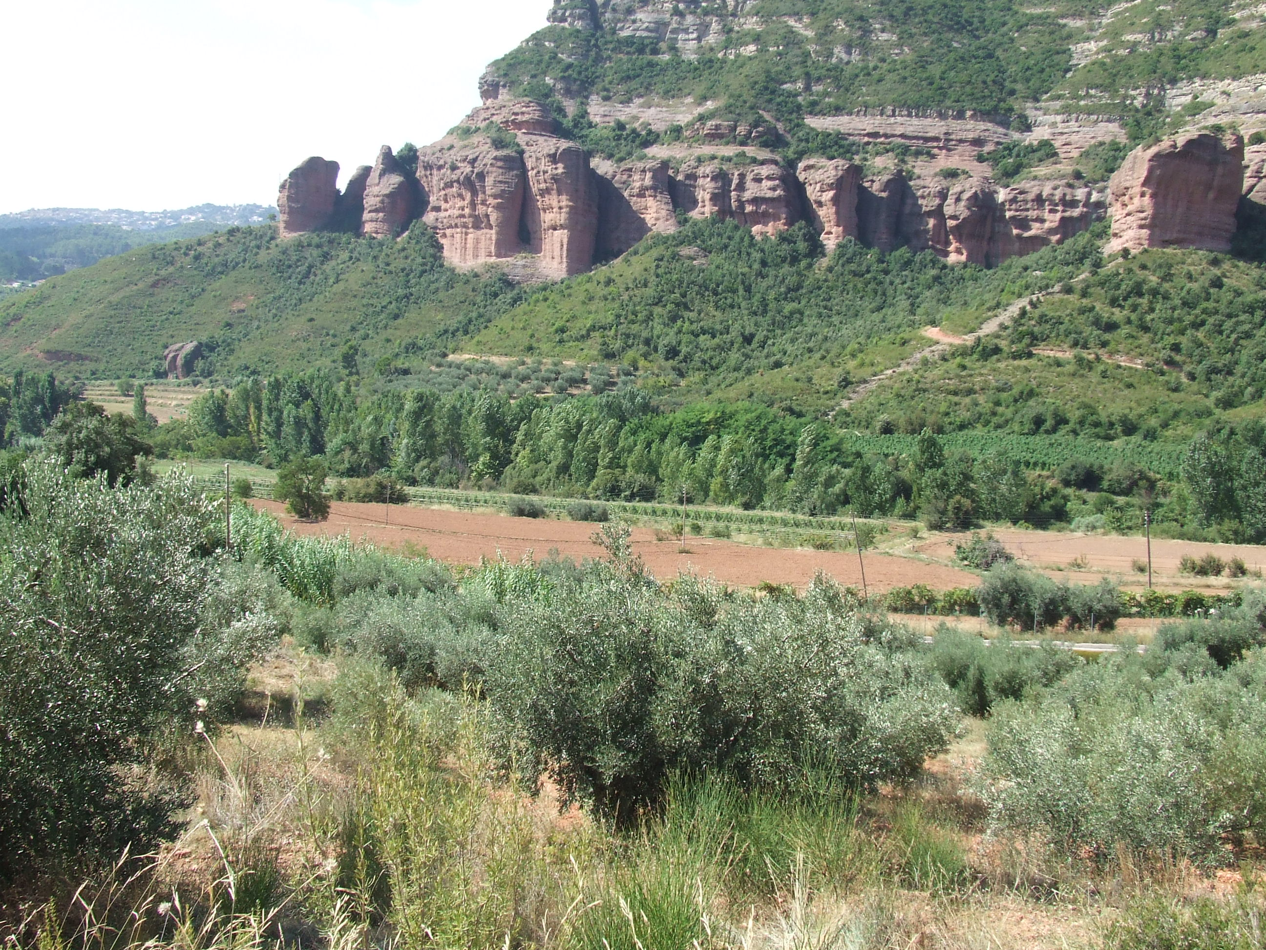 La Vall de Sant Miquel (Riells del Fai, Bigues i Riells, Vallès Oriental)